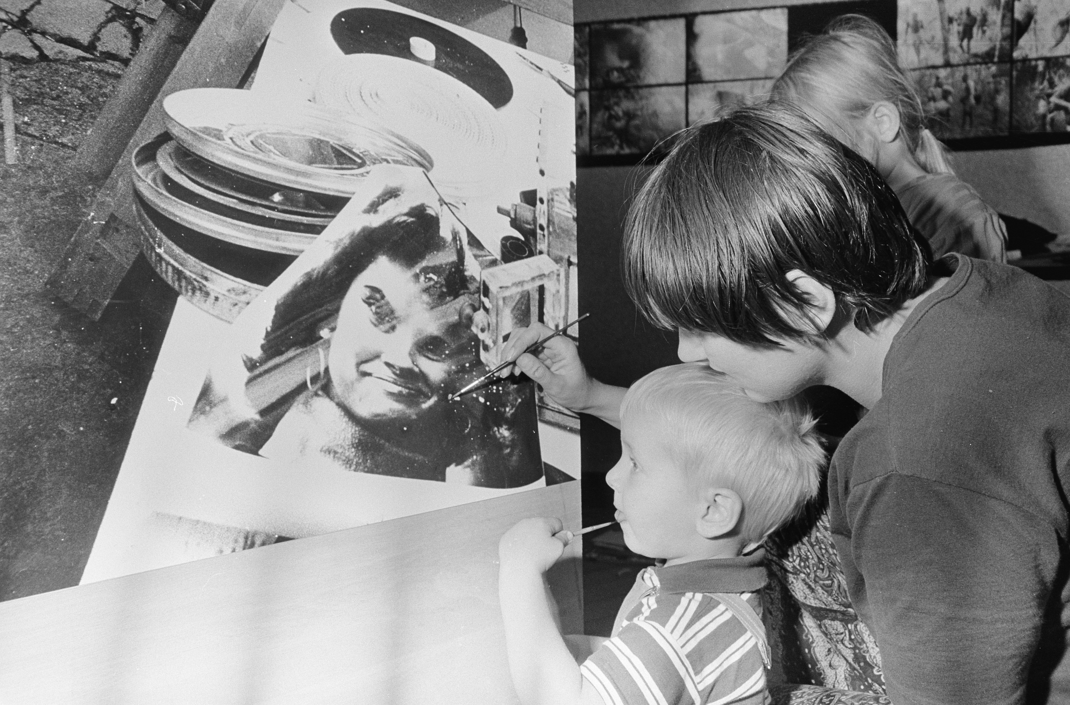 Tentoonstelling "Hee ... zie je dat?" van Ed van der Elsken in het Stedelijk Museum te Amsterdam. Eds vrouw Gerda van der Veen en zoon Daan van der Elsken. Rechtsachter is dochter Tinelou nog net zichtbaar.